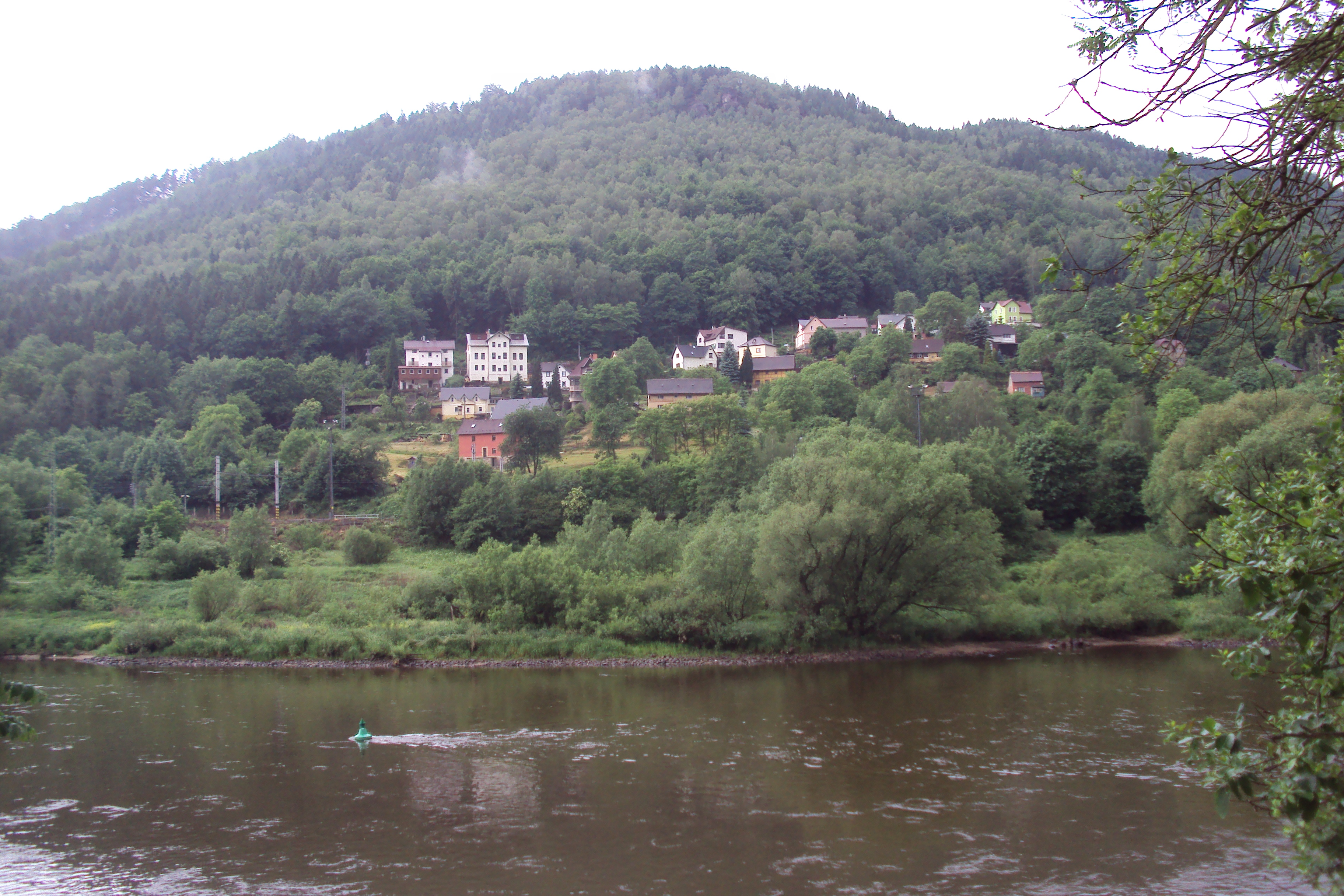 Prostřední Žleb, kopec Vrásník, od benzinky Agip na druhém břehu Labe